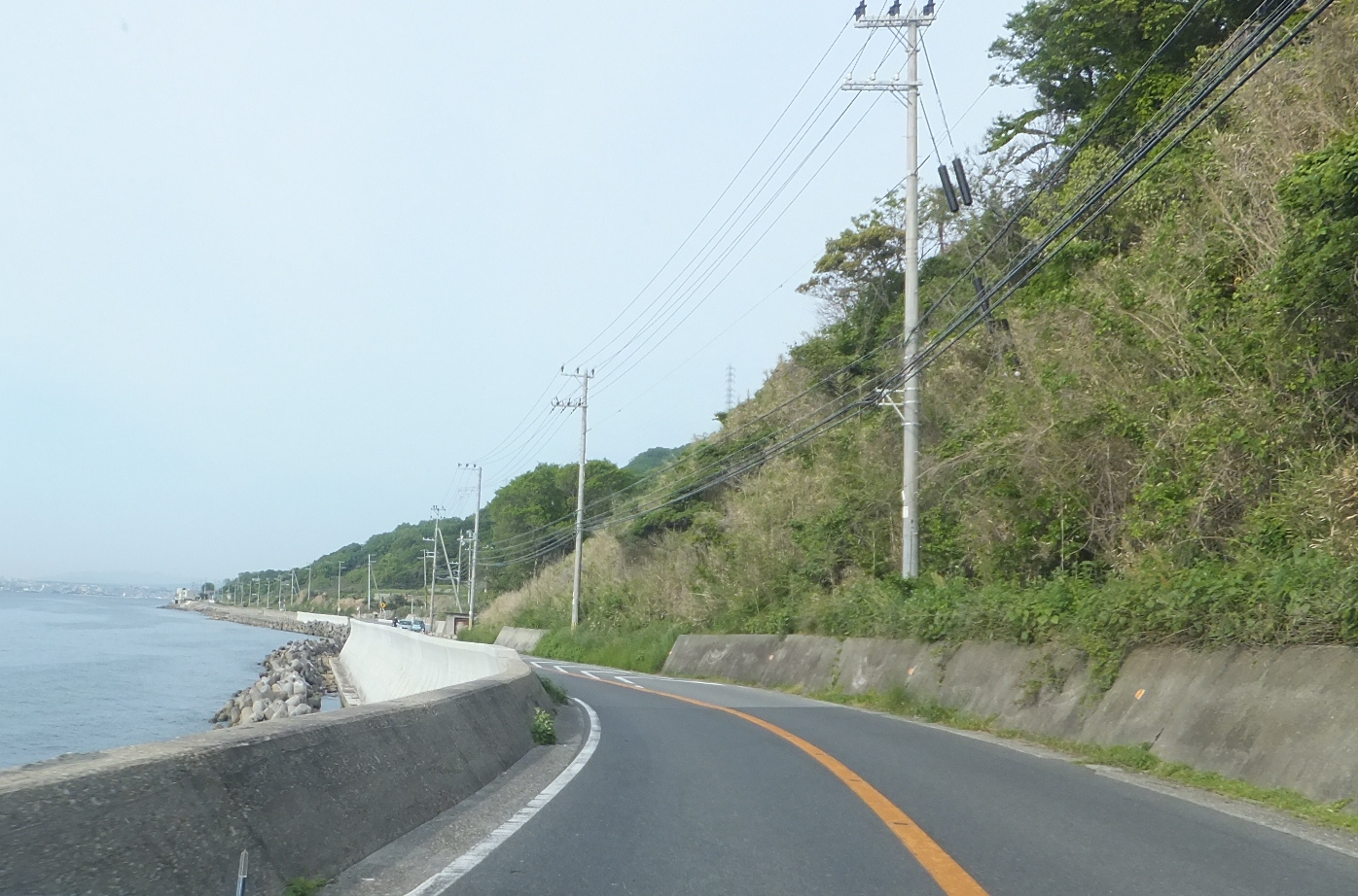 兵庫県淡路市野島驫木 兵庫県道31号福良江井岩屋線